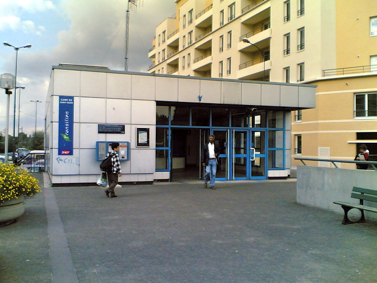 Gare RER C de Saint-Ouen, Seine-Saint-Denis, France